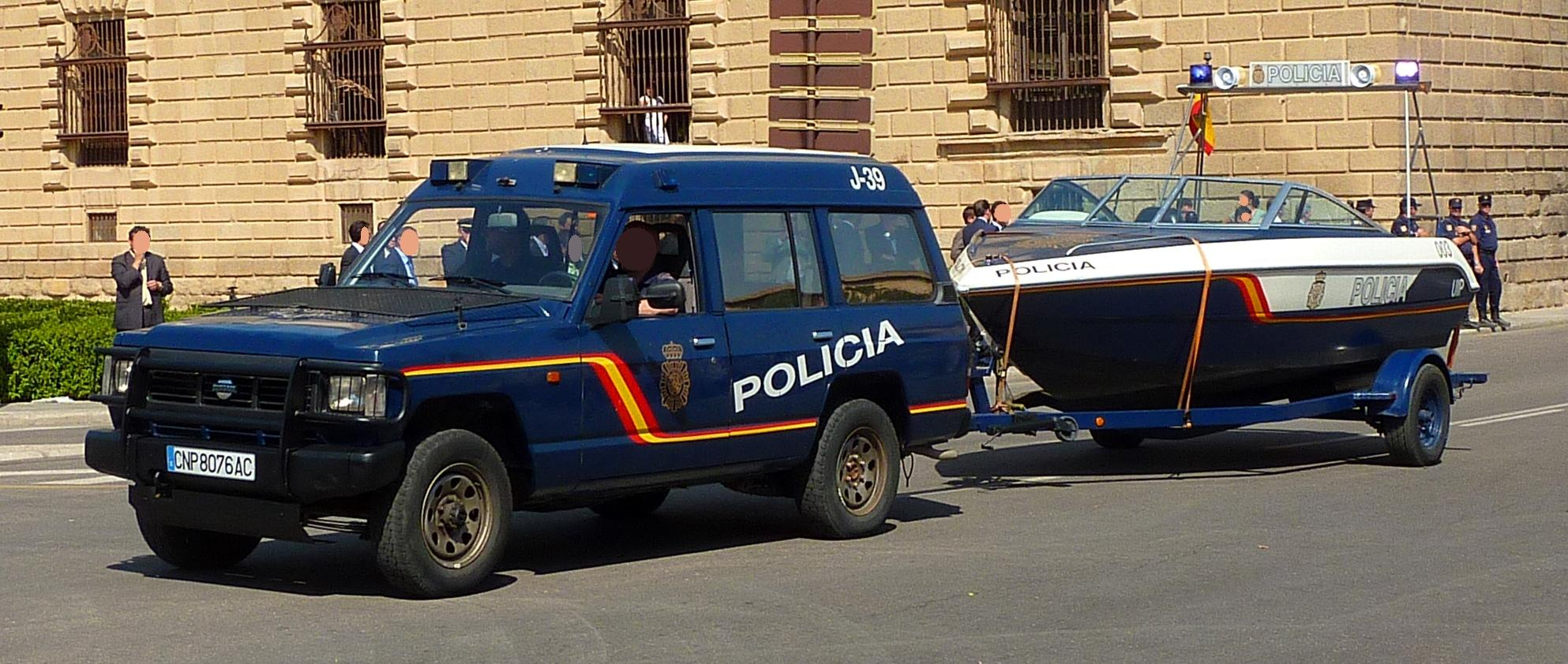 Patrullera del Cuerpo Nacional de Policía de España.